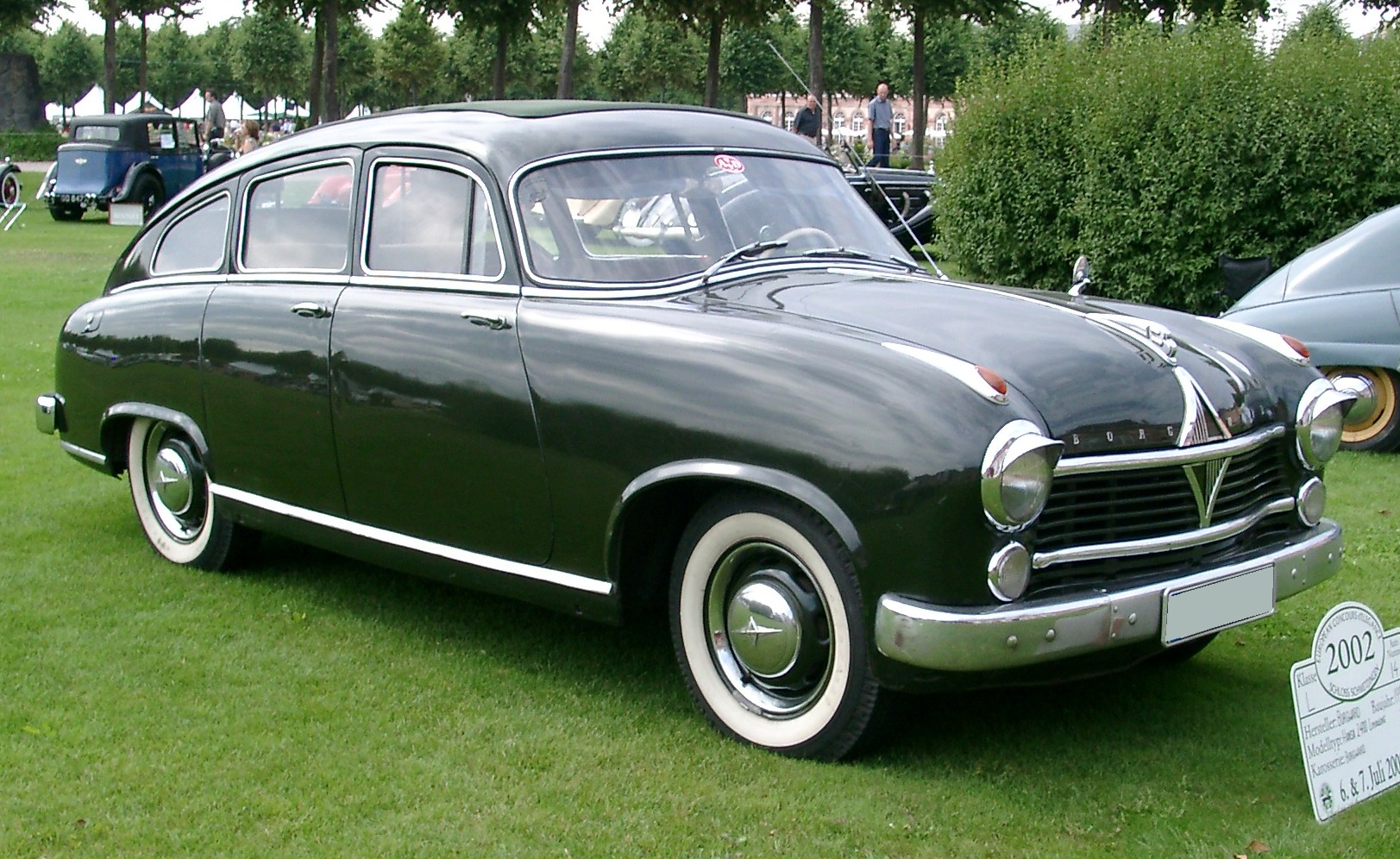 Borgward Hansa 2400 Limousine, Baujahr 1952. Fotografiert anläßlich des European Concours d'Elegance 2002 in Schwetzingen